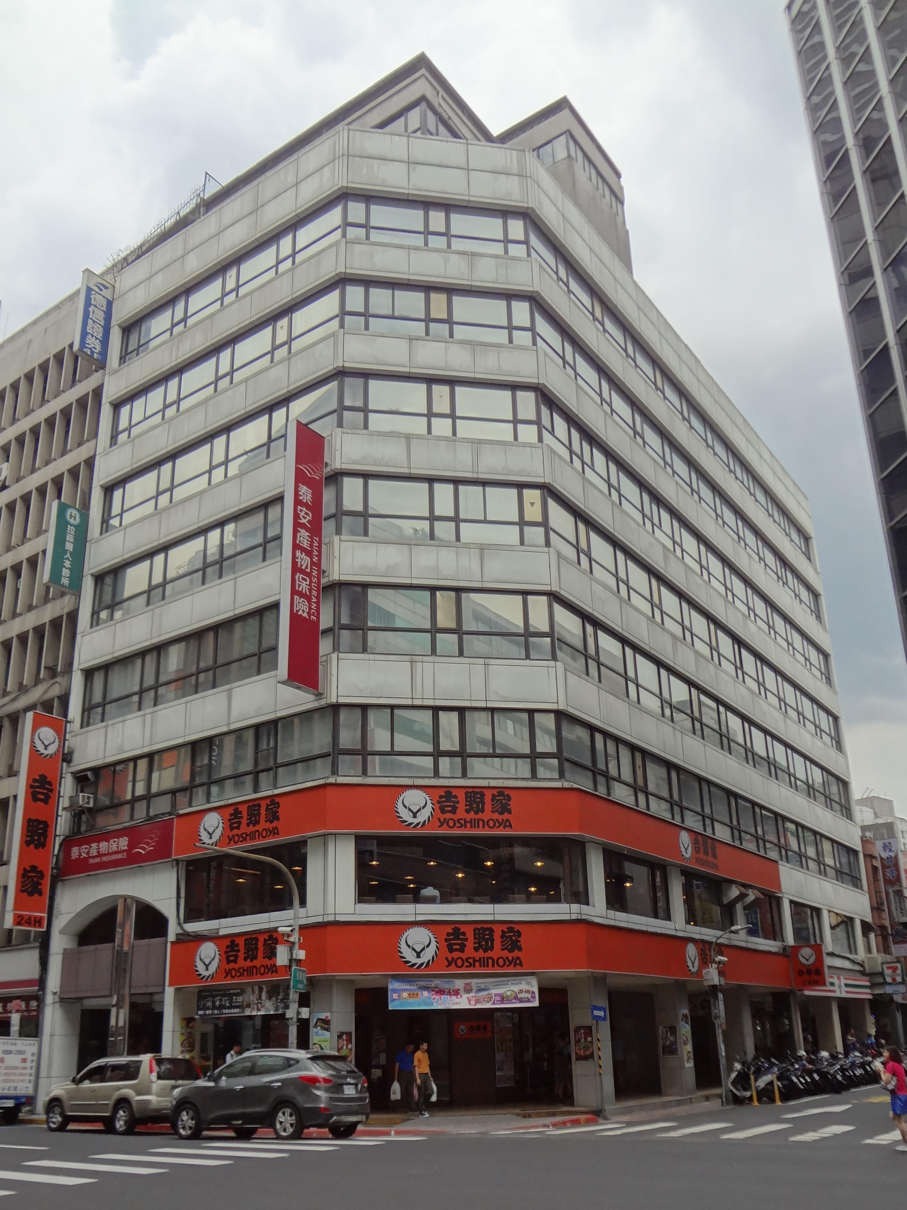 泰安大樓，是泰安產物保險總部，1至2樓為吉野家館前店。地址：臺北市中正區館前路59號。